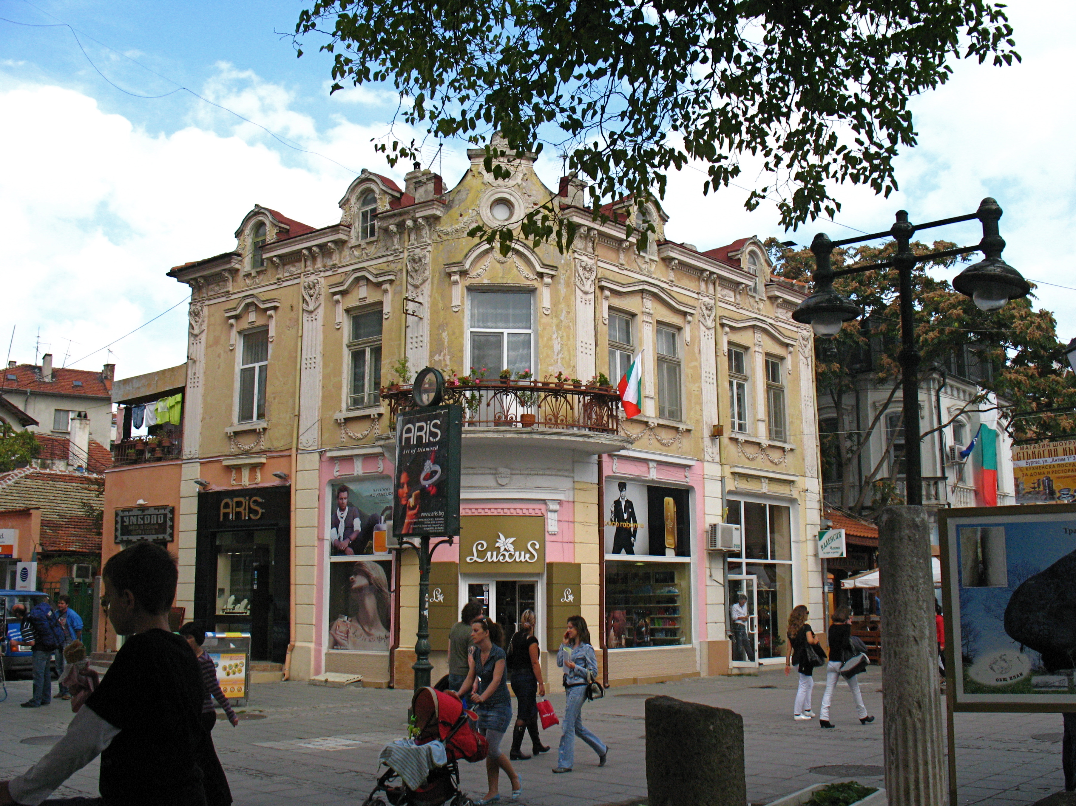 Бургас_4278